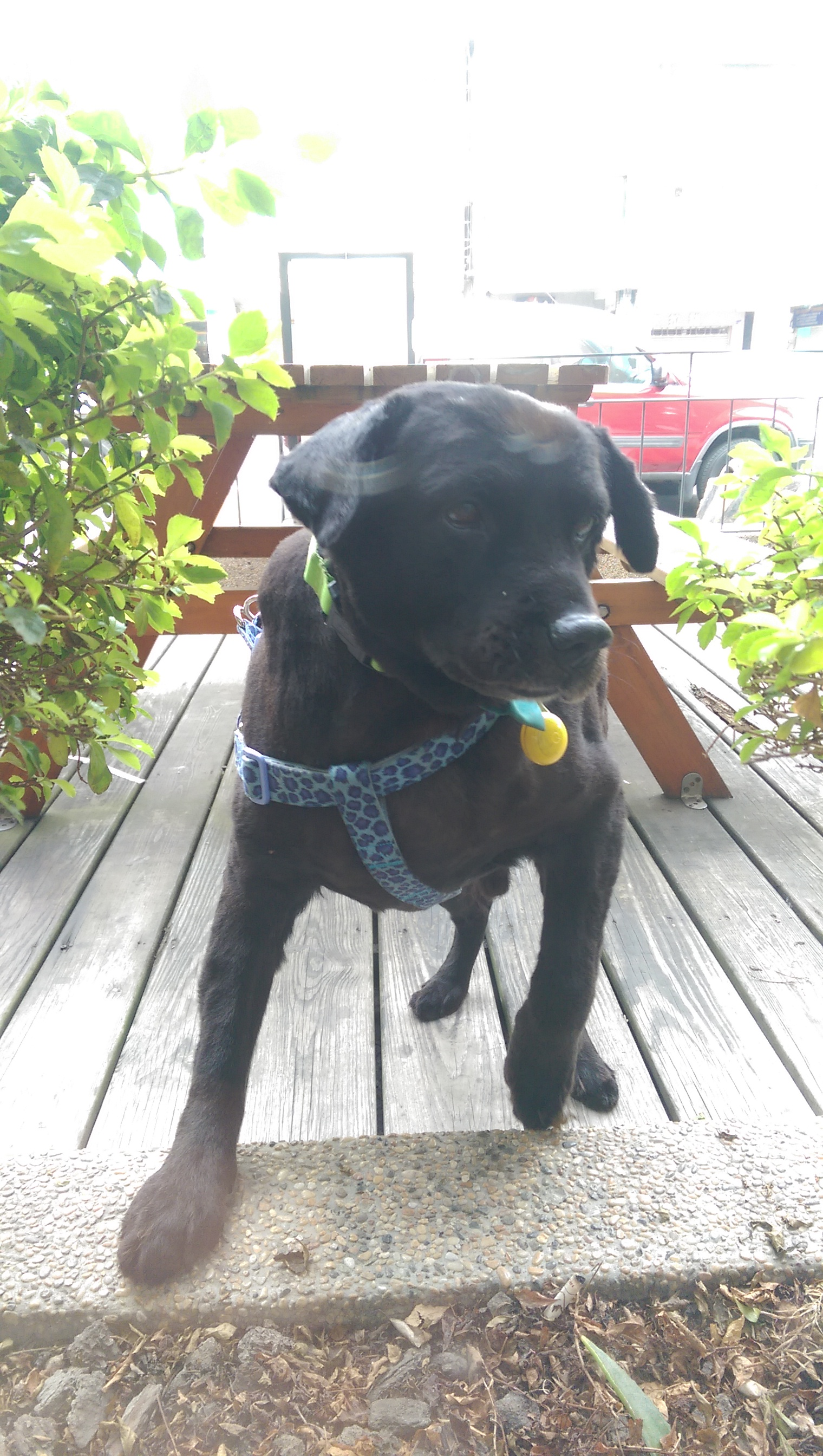 混種拉不拉多